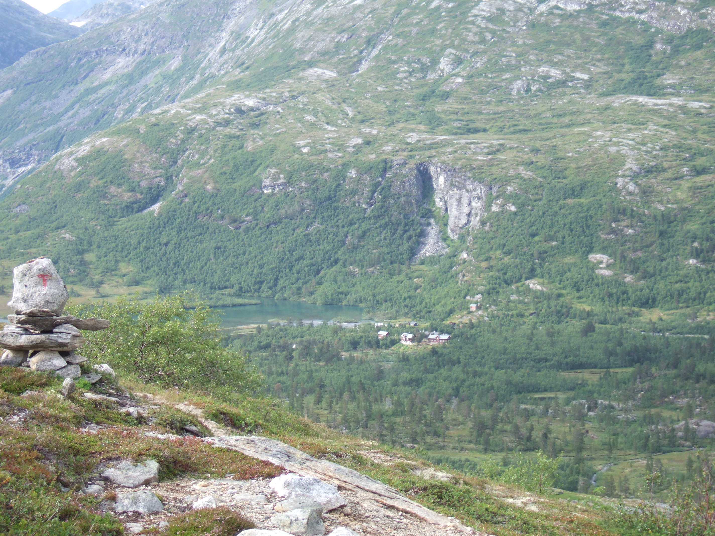 Reindalseter tourist lodge at Langvatnet in Reindalen (Tafjord) and Ålesund-Sunnmøre Turistforening most visited cabin.